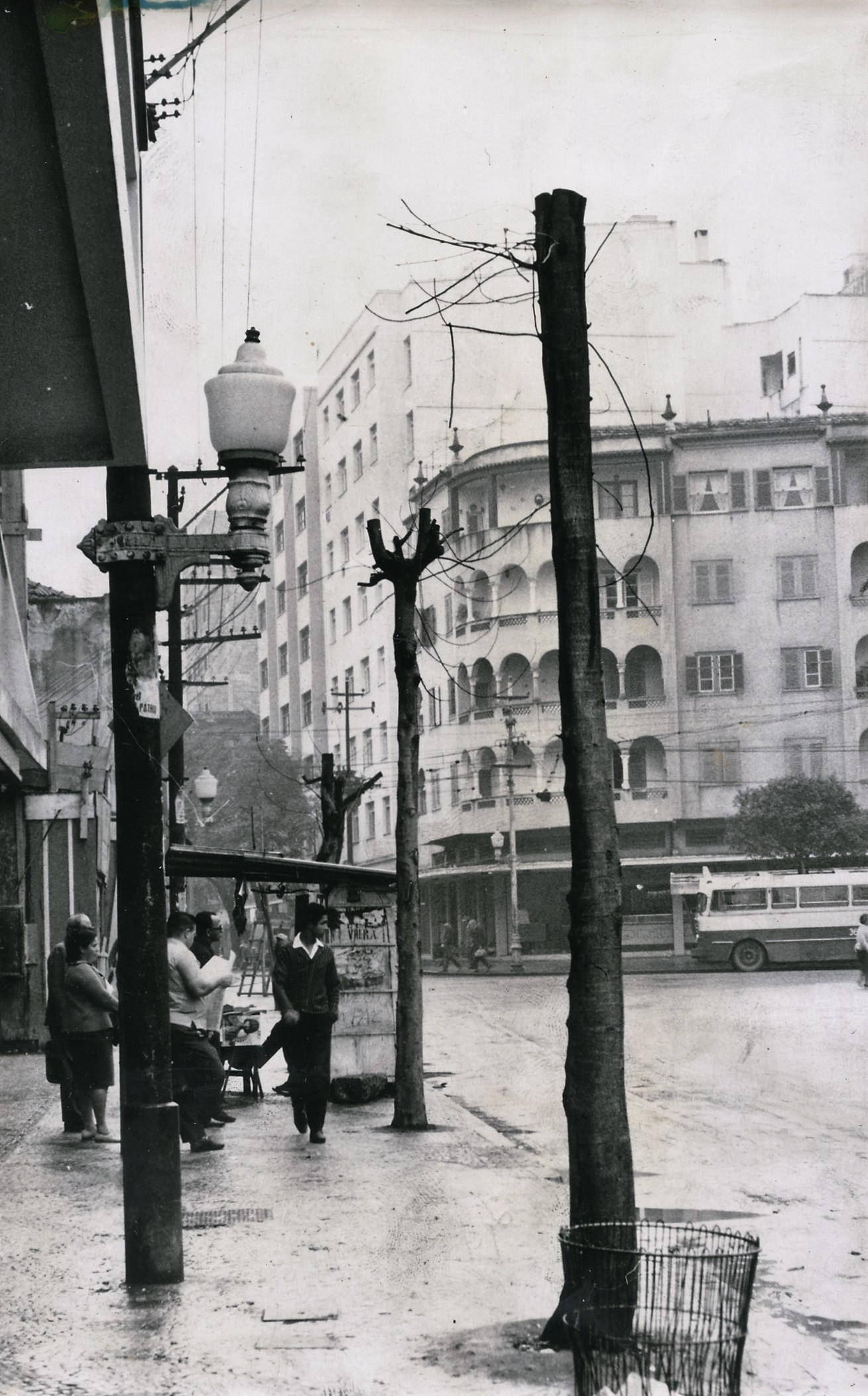 Fotografia do Fundo Correio da Manhã, sob a guarda do Arquivo Nacional.